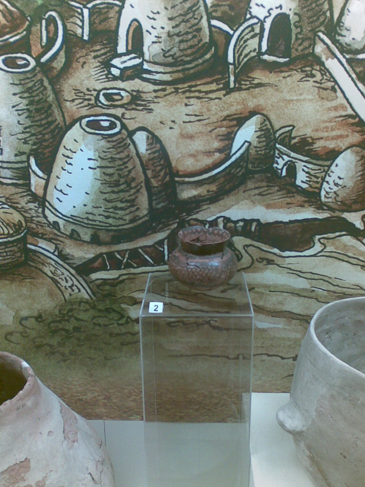 I Kültəpə yaşayış yerindən aşkarlanmış boyalı gil qab, Azərbaycan Milli Tarix Muzeyində saxlanılır